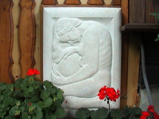 Prüfungsarbeit Wien, 1946. "Der Stein war so teuer und ich hatte so großen Hunger" (OT Hellmuth Marx).